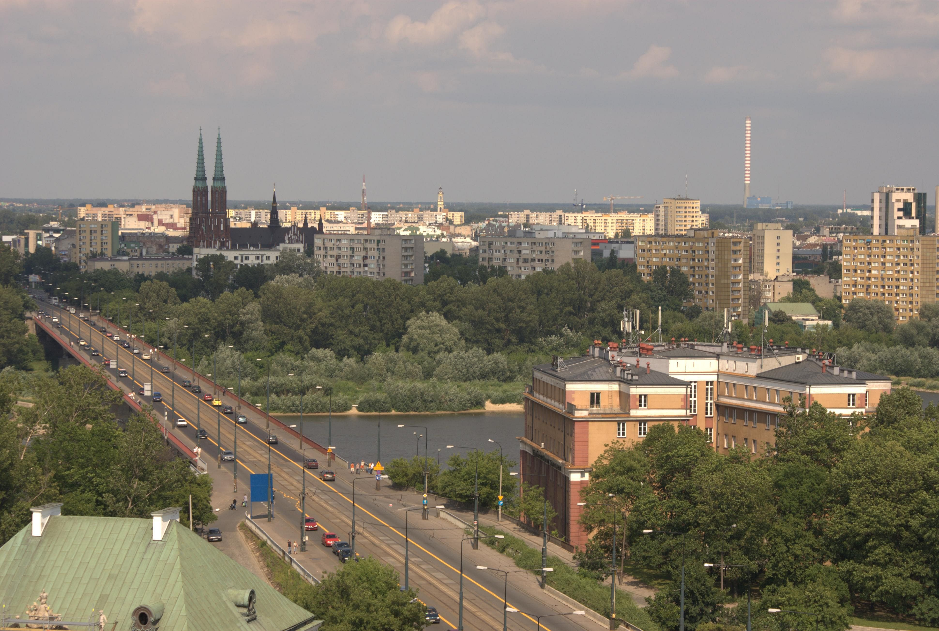 Most Śląsko-Dąbrowski, Trasa W-Z i panorama Pragi w Warszawie